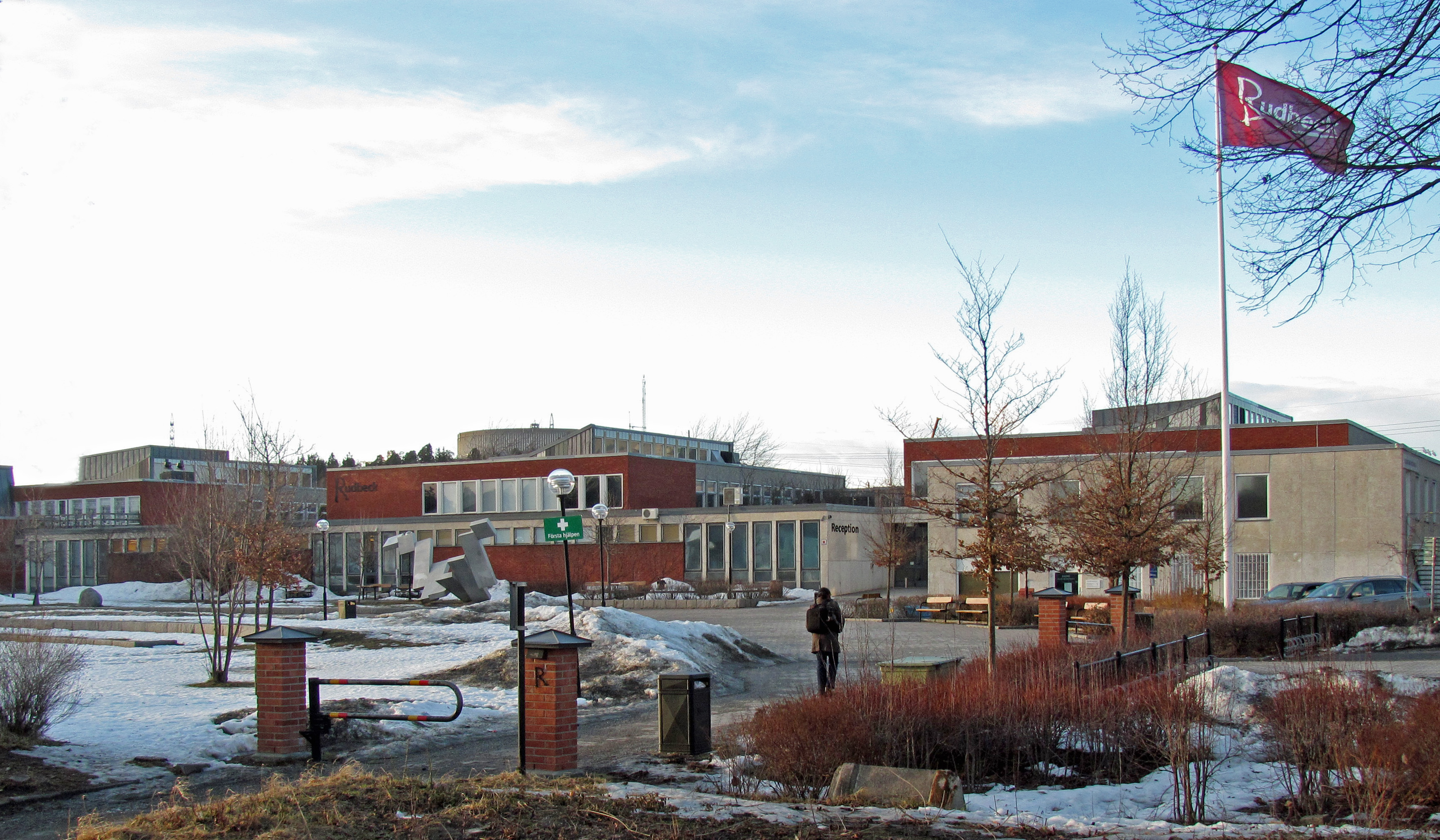 Rudbecksskolan, Sollentuna